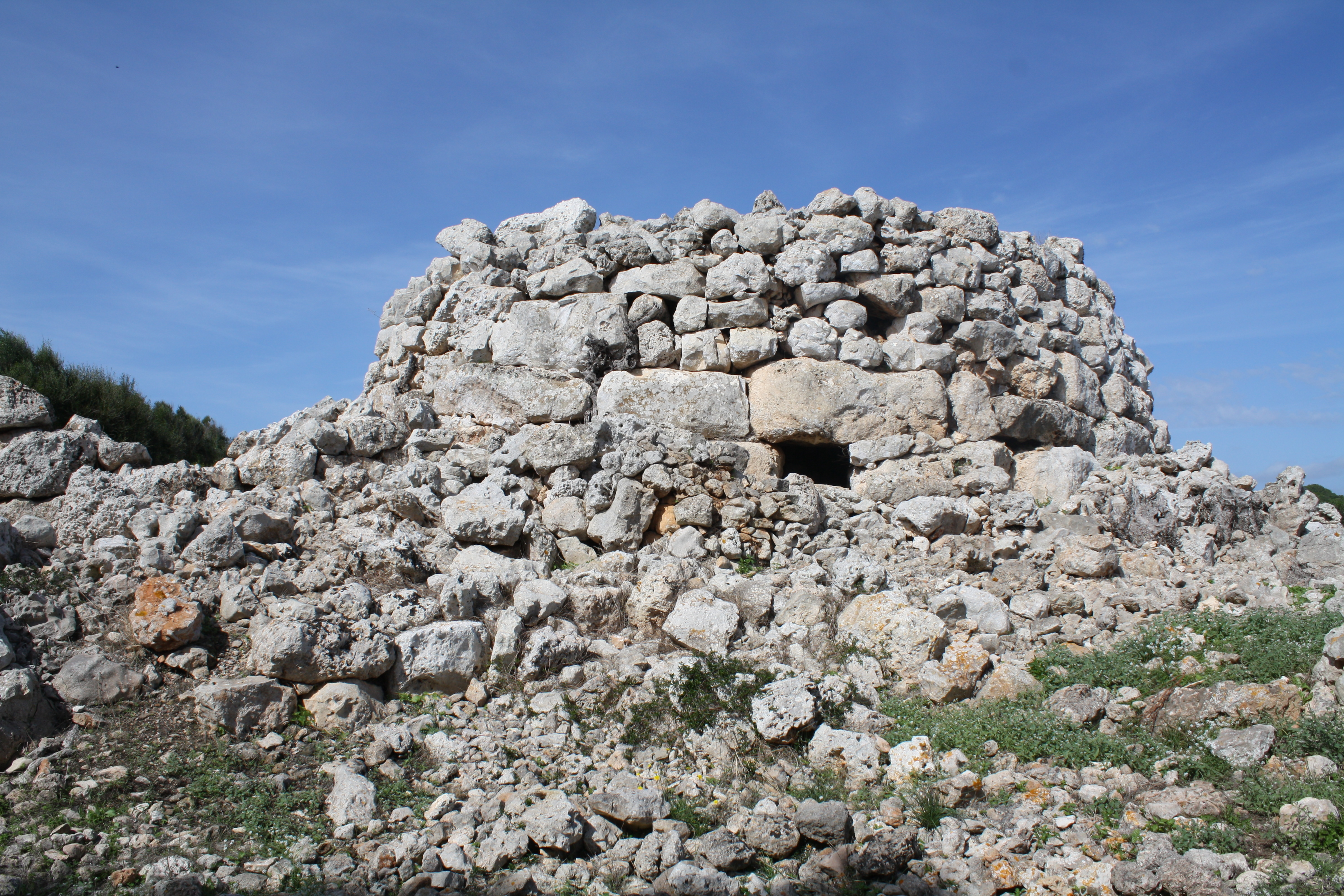 Talayotisches Dorf von Sant Agustí: östlicher Talayot mit verschüttetem Zugang